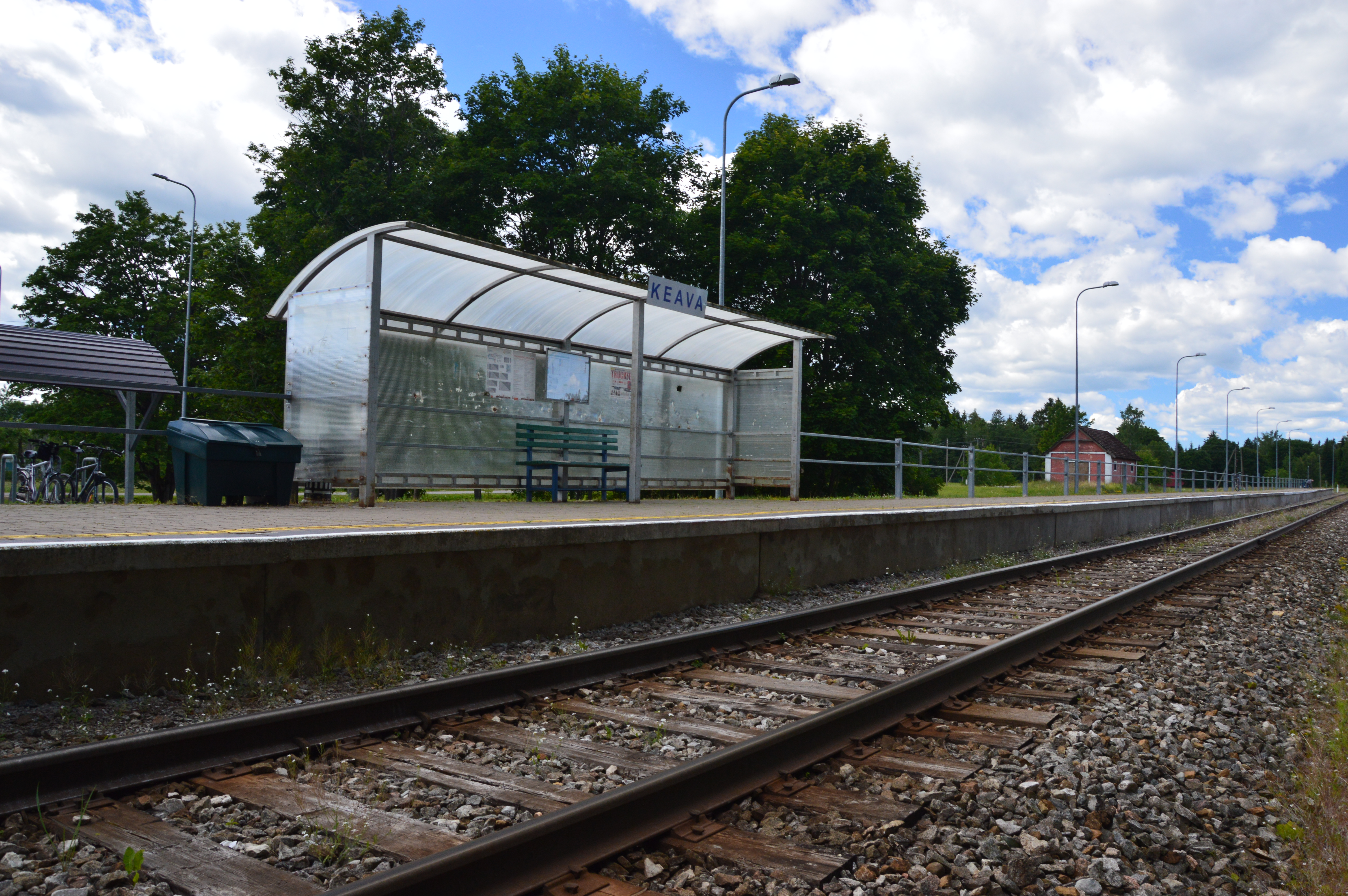 Keava raudteepeatus